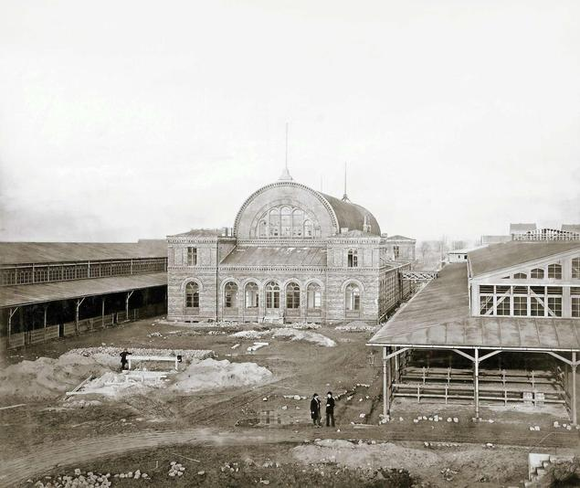 Vieh- und Schlachthof Strousberg in der Brunnenstraße (Mitte/Wedding), 1870. Foto: Hermann Günther.